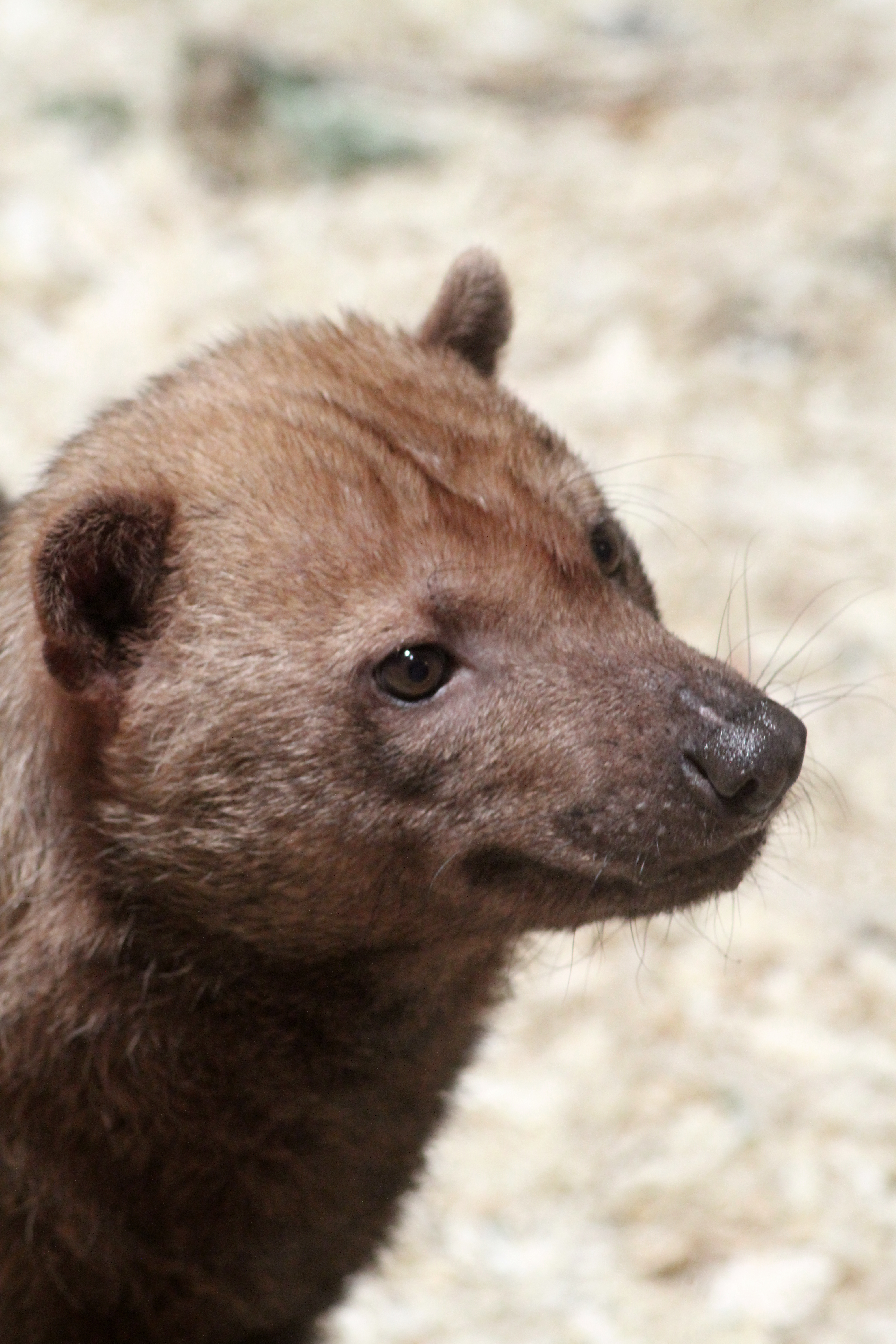 Waldhund